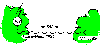 Realizacja zdalnego sterowania radiostacji UKF małej mocy. Zdjęcie pochodzi ze strony